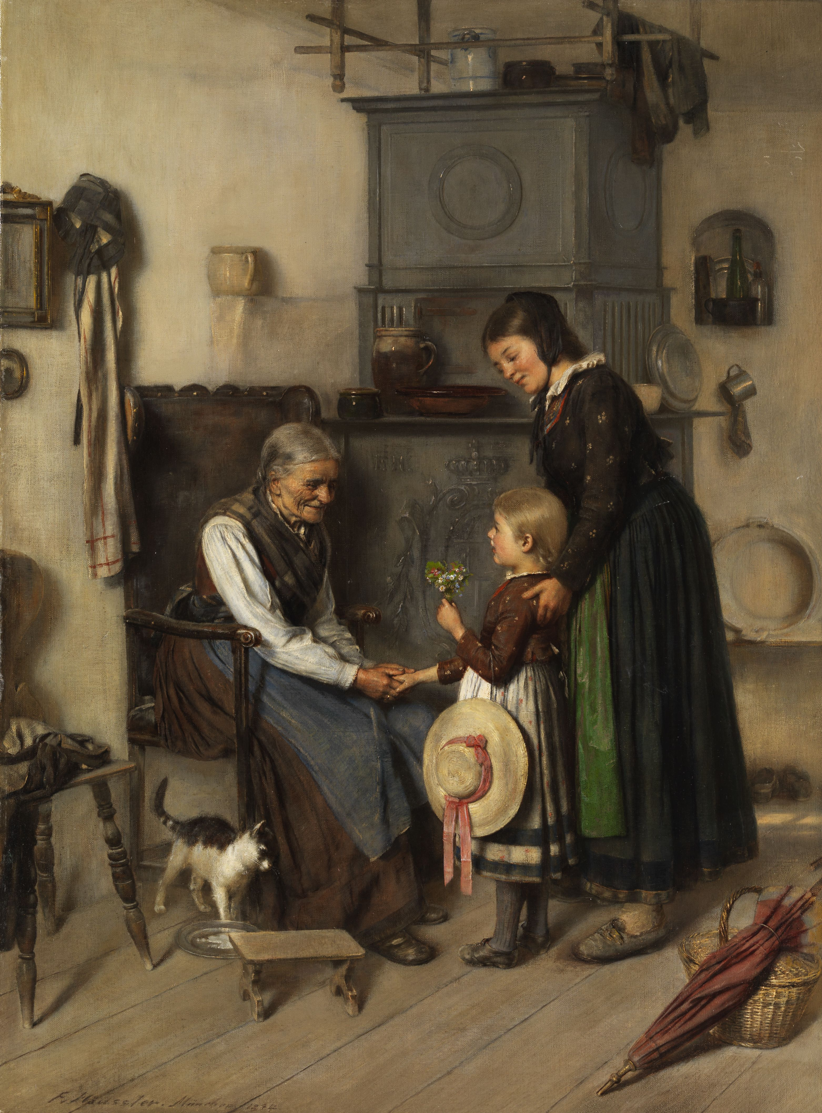 Kleine Gratulantin. Öl auf Leinwand. 64 x 57,5 cm. Links unten signiert, ortsbezeichnet „München“ und datiert „1874“.